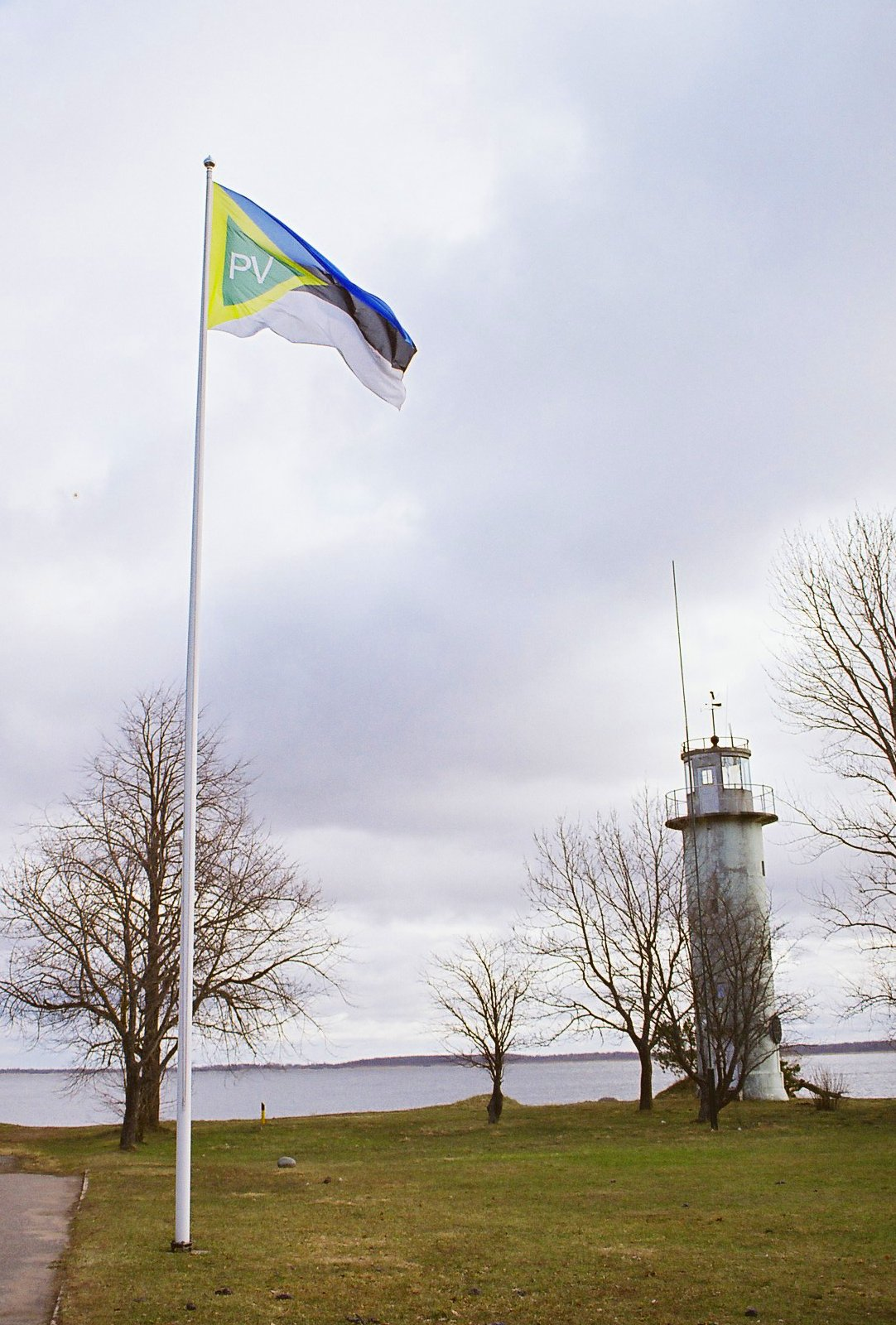 Mehikoorma tuletorn